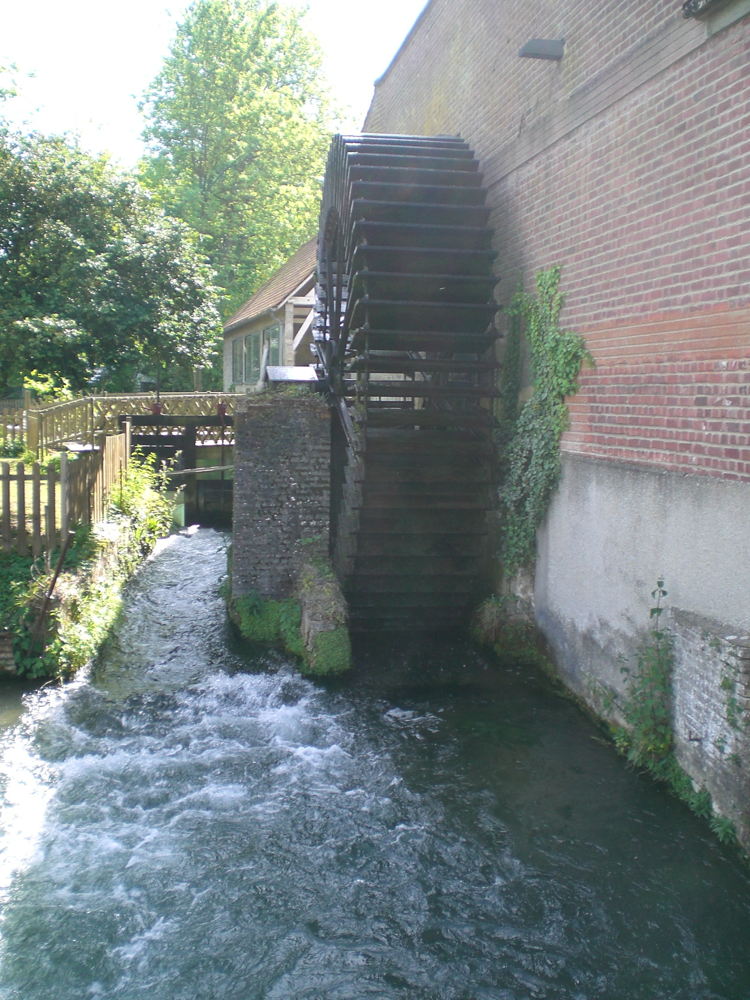 la roue du moulin de Longpré-les-Corps-Saints sur l'Airaines